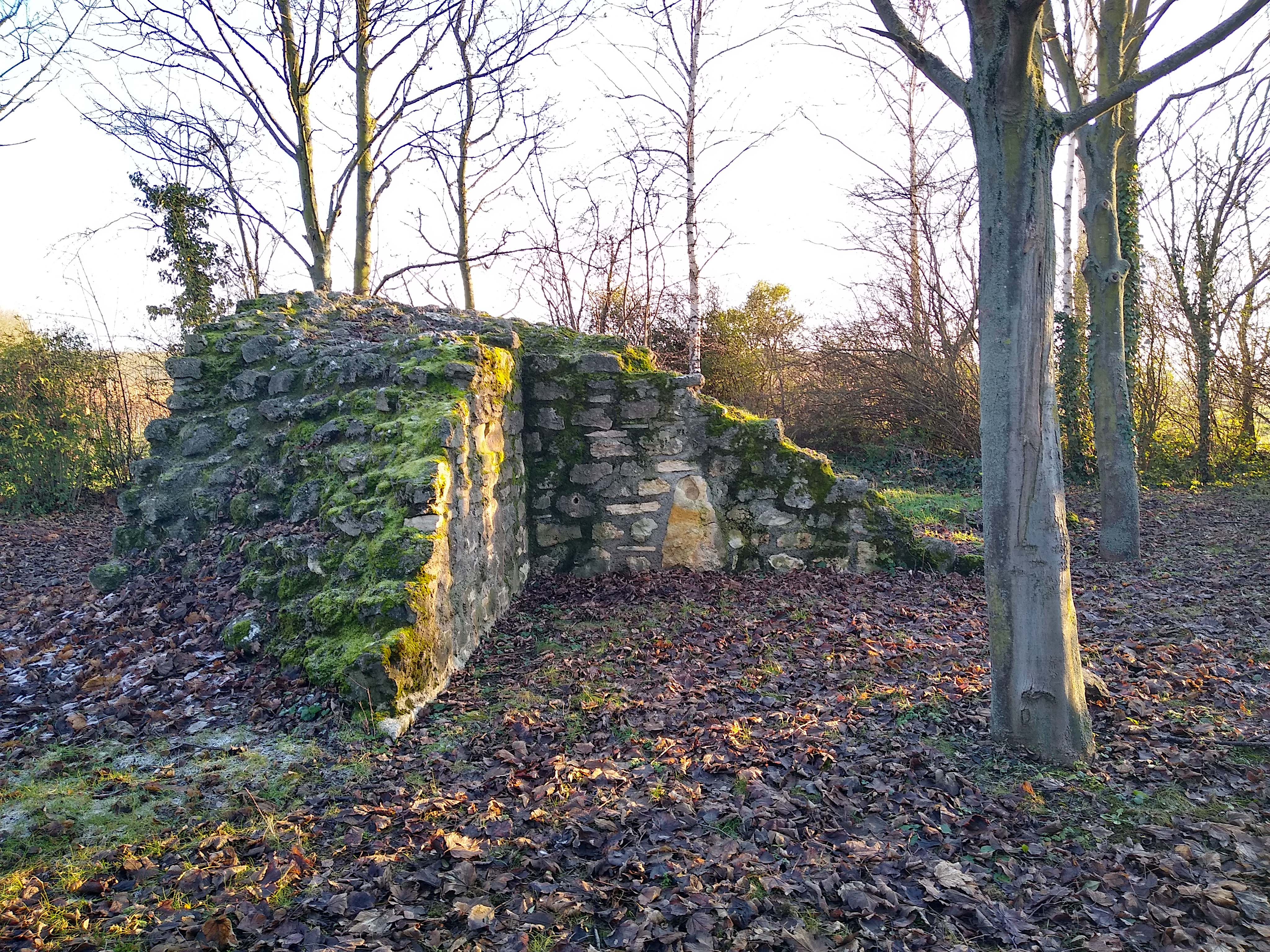 Überreste einer villa rustica östlich von Albig (Flur Hammerstein)